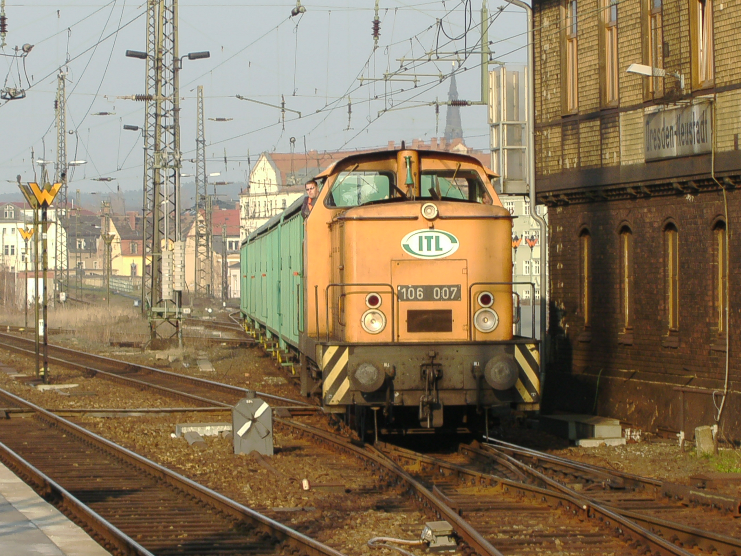 Der aus Wilthen kommende "Schnapszug" erreicht den Bahnhof Dresden-Neustadt. Als Triebfahrzeug dient ITL 106 007 - trotz der Nummer nie eine DR-Lok